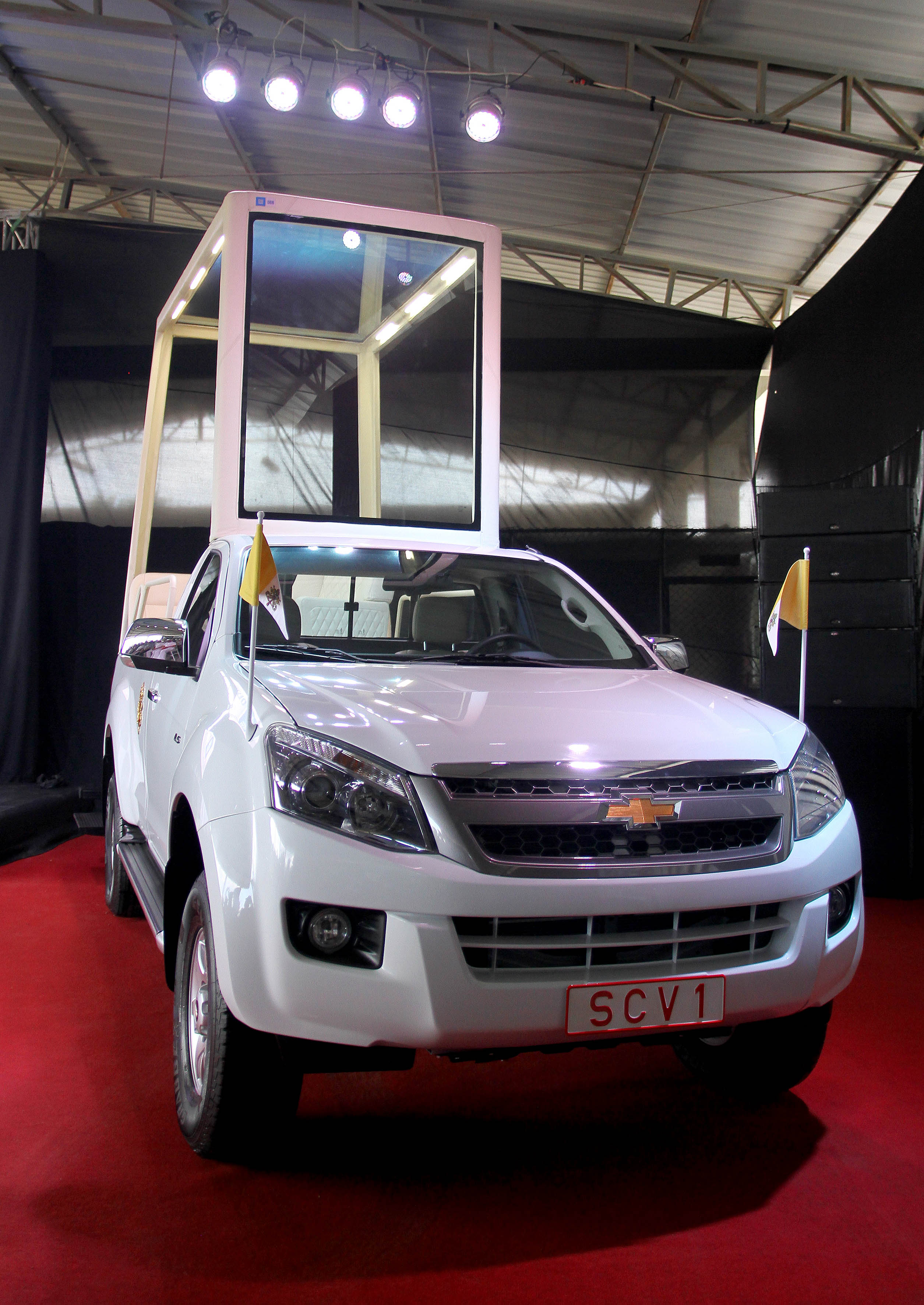 Guayaquil, 01 de jul del 2015 (Andes).-En el Fuerte Militar Huancavilca se realizó la presentación, entrega y bendición del vehículo que usará el papa Franscisco durante su estadia en Guayaquil Foto:César Muñoz/Andes